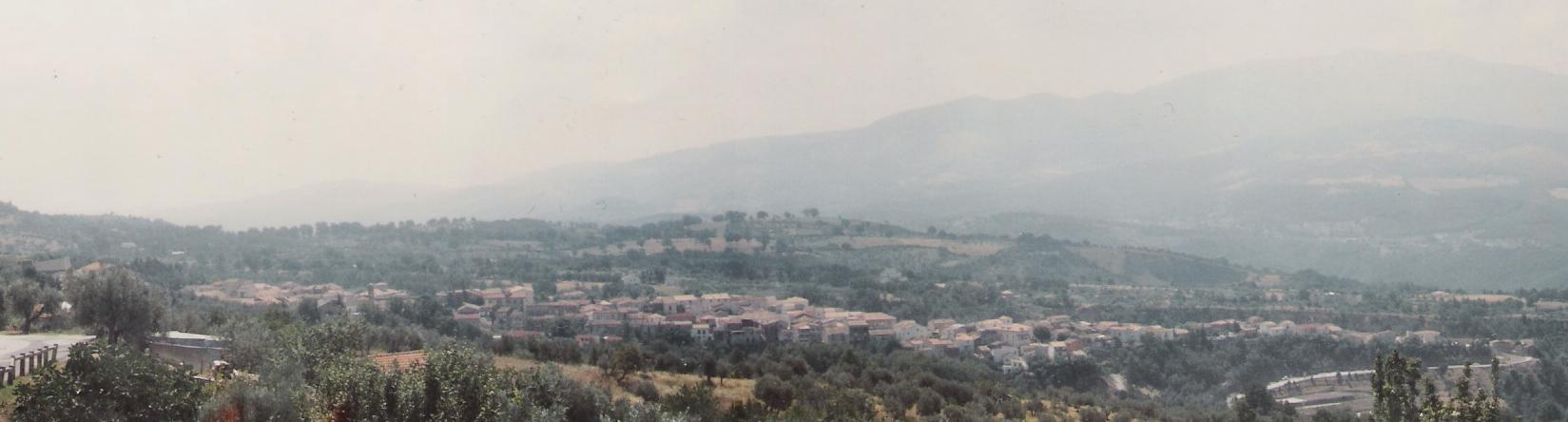 Veduta panoramica di Montemurro. Pubblico dominio, fatta da me.